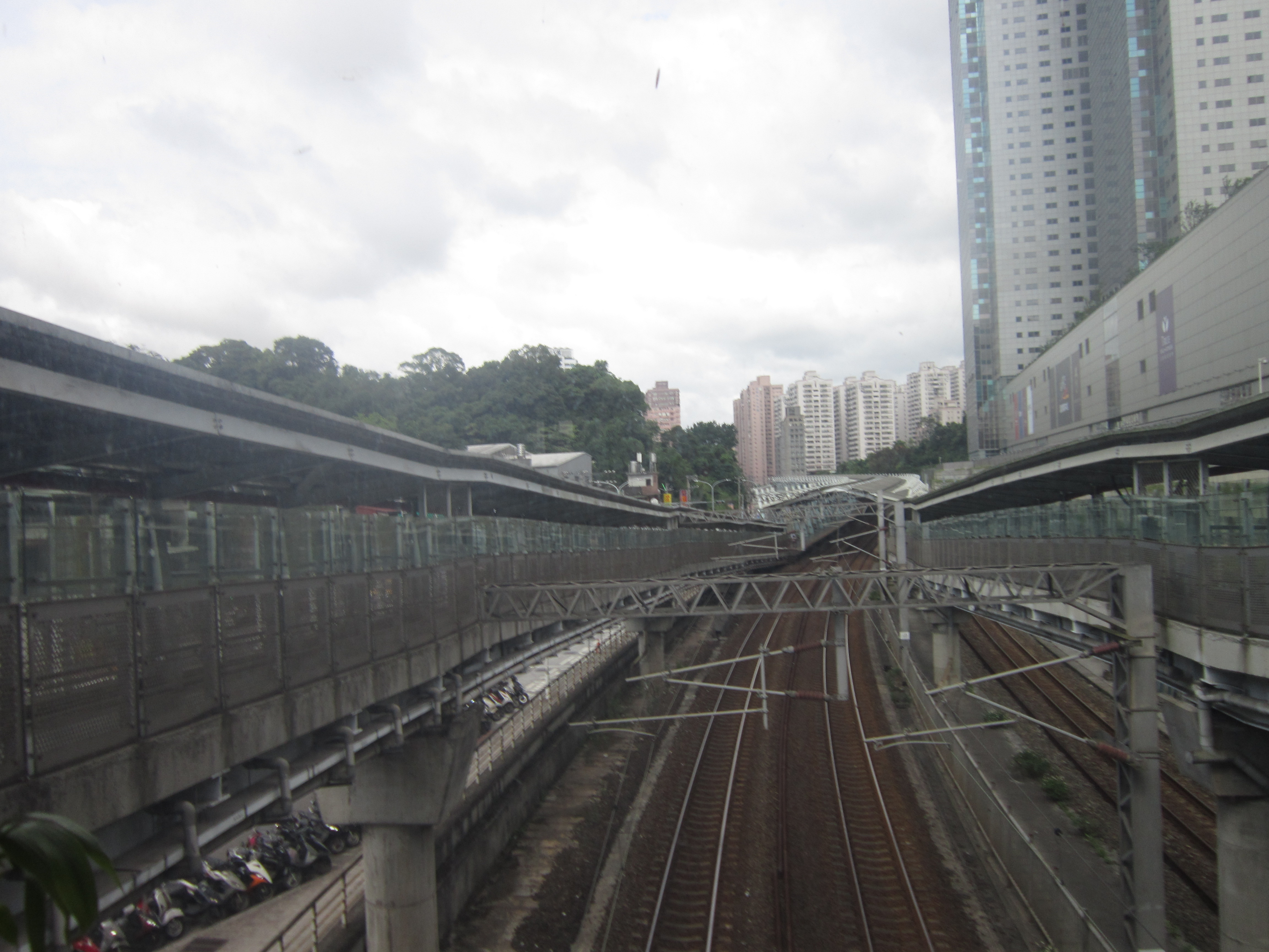 臺灣鐵路管理局汐科車站南站往北遠眺通往月台的長廊